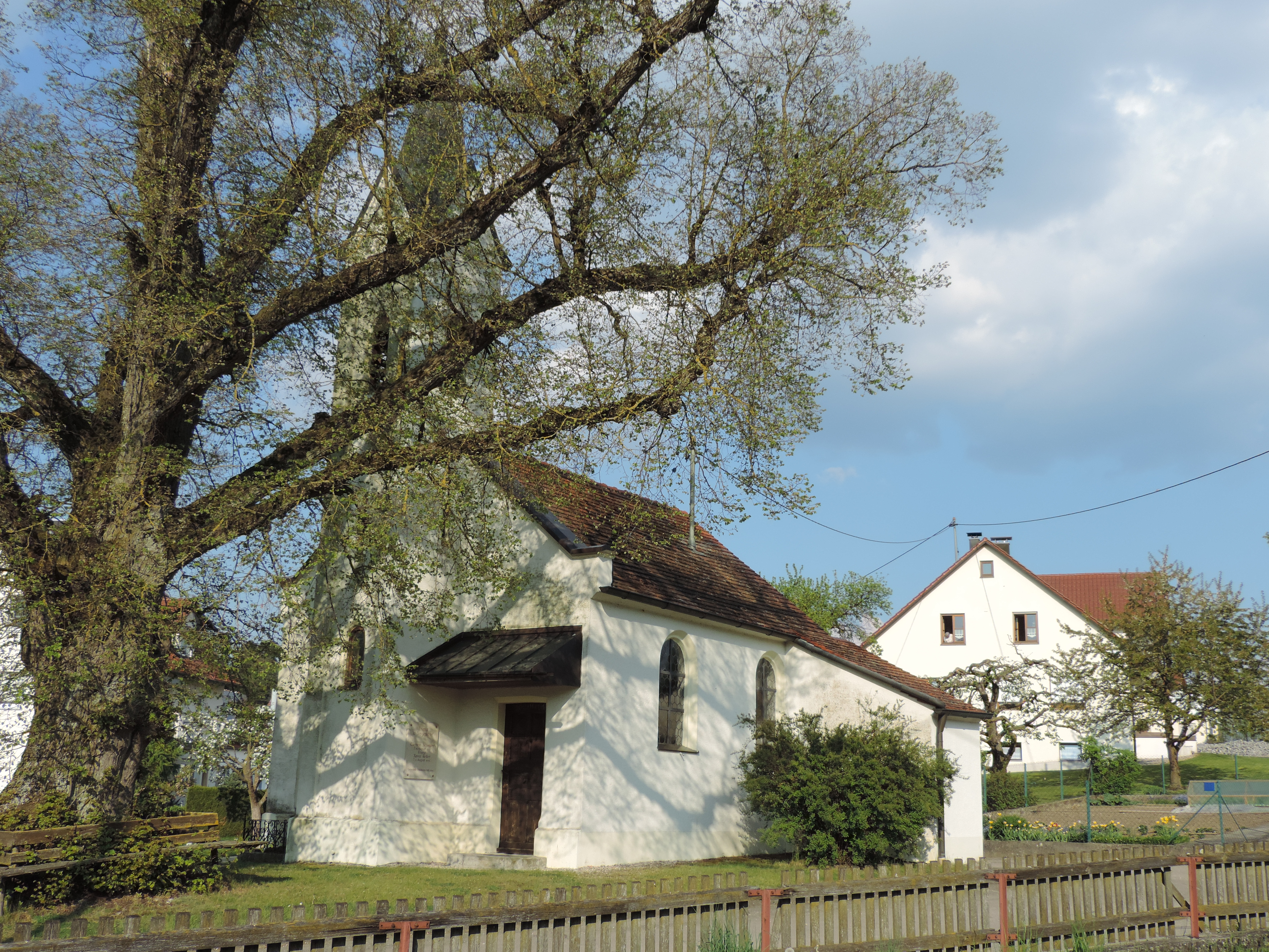 Katholische Kapelle, um 1840/50; mit Ausstattung.